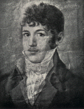 César Malan (1787-1864) im Alter von 20 Jahren